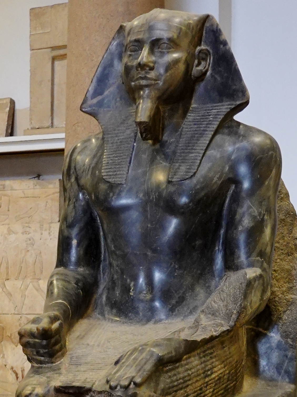 Sitzstatue des Königs Chephren der 4. altägyptischen Dynastie, ausgestellt im Ägyptischen Museum in Kairo, Ägypten